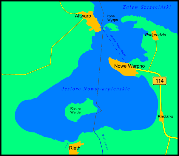 Jezioro Nowowarpieńskie i okolice.